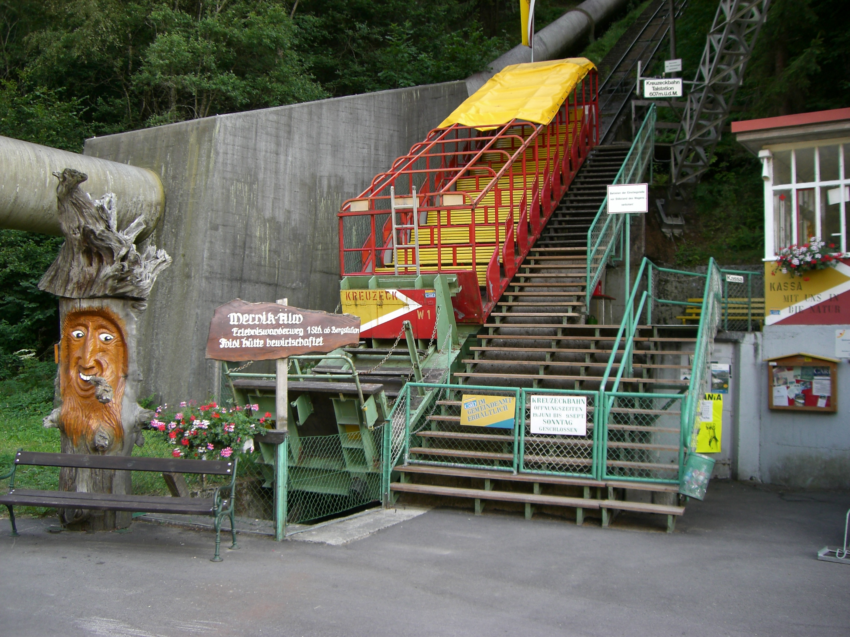 Kreuzeckbahn - Funicular in Kolbnitz, Carinthia, Austria